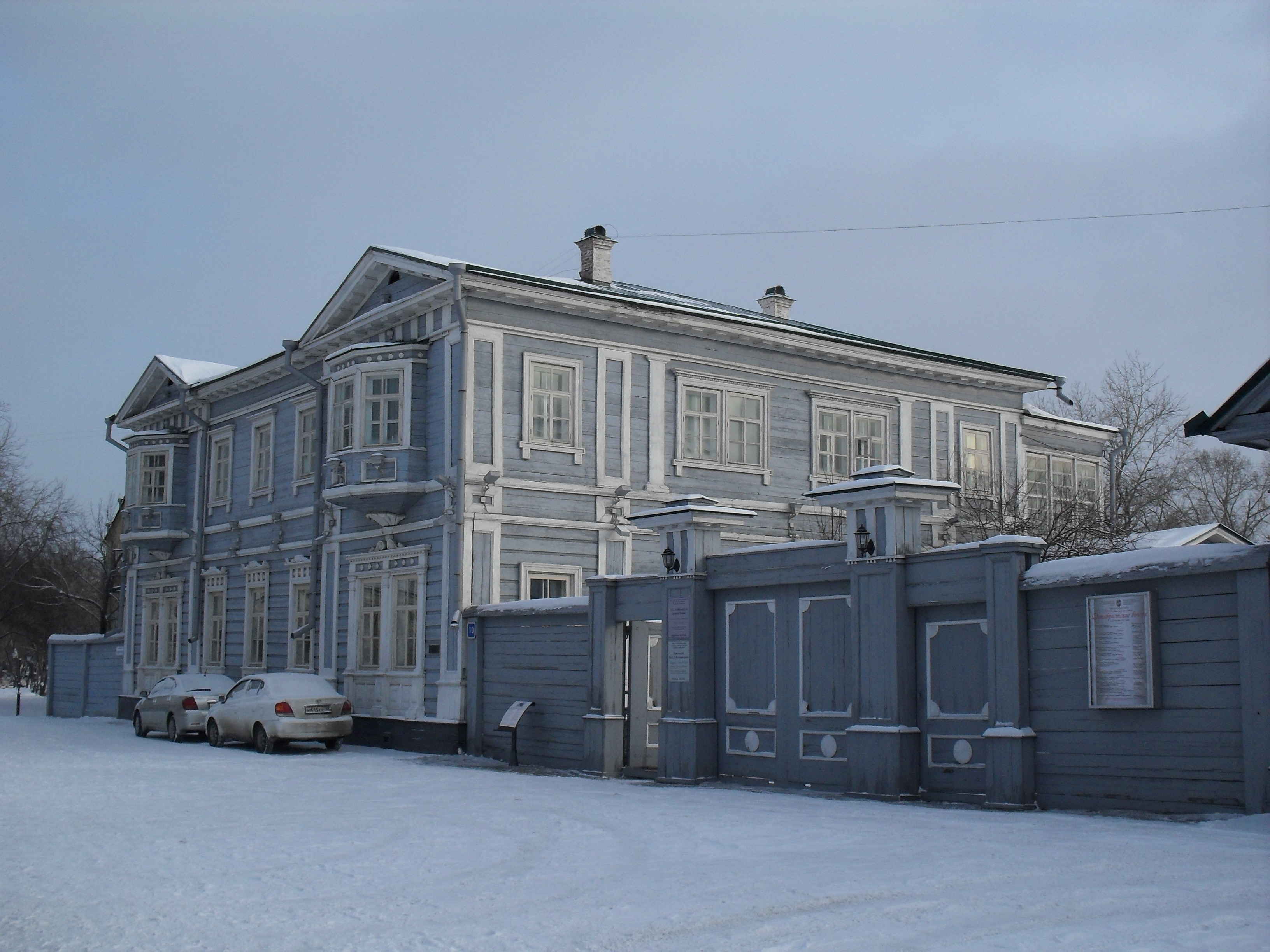 Иркутск. Дом Волконского